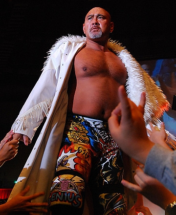 武藤敬司在出場時接受觀眾歡呼。